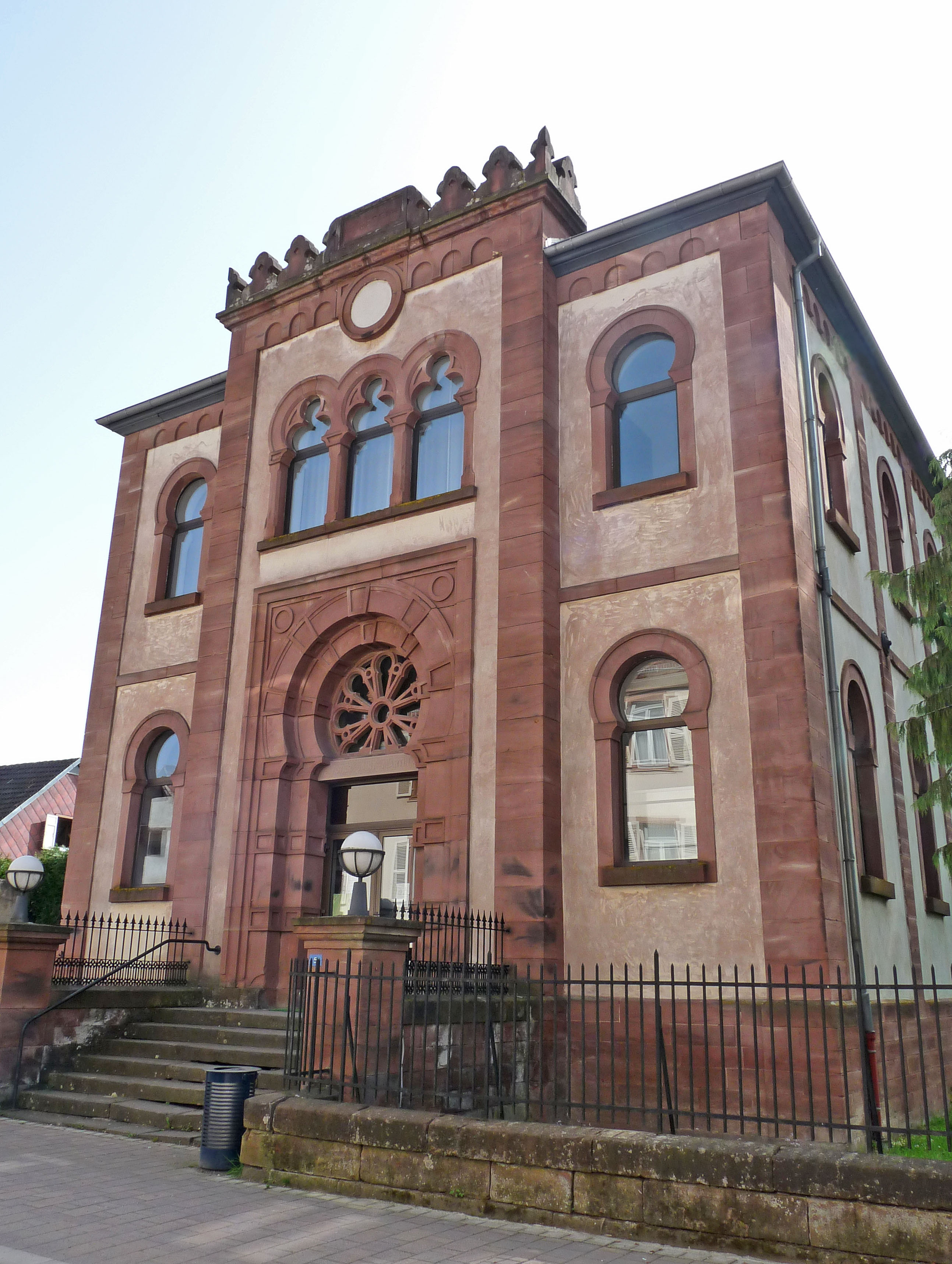 Ancienne synagogue de Niederbronn (Bas-Rhin). Terminée en 1869. Actuellement Foyer paroissial catholique. Inscrite à l'inventaire des monuments historiques.